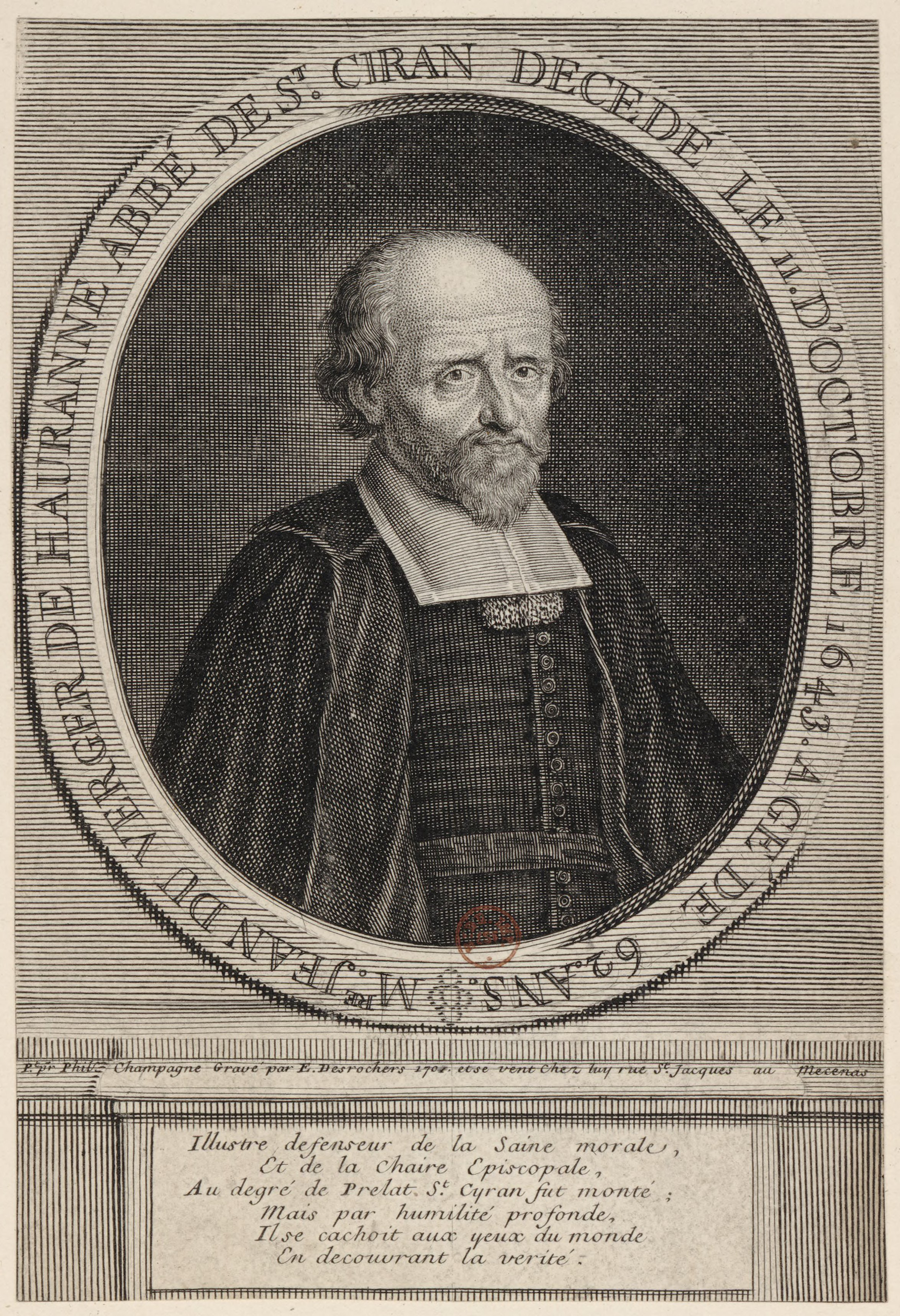 Portrait de Jean Duvergier de Hauranne, abbé de Saint-Ciran, en buste, de 3/4 dirigé à droite, dans une bordure ovale